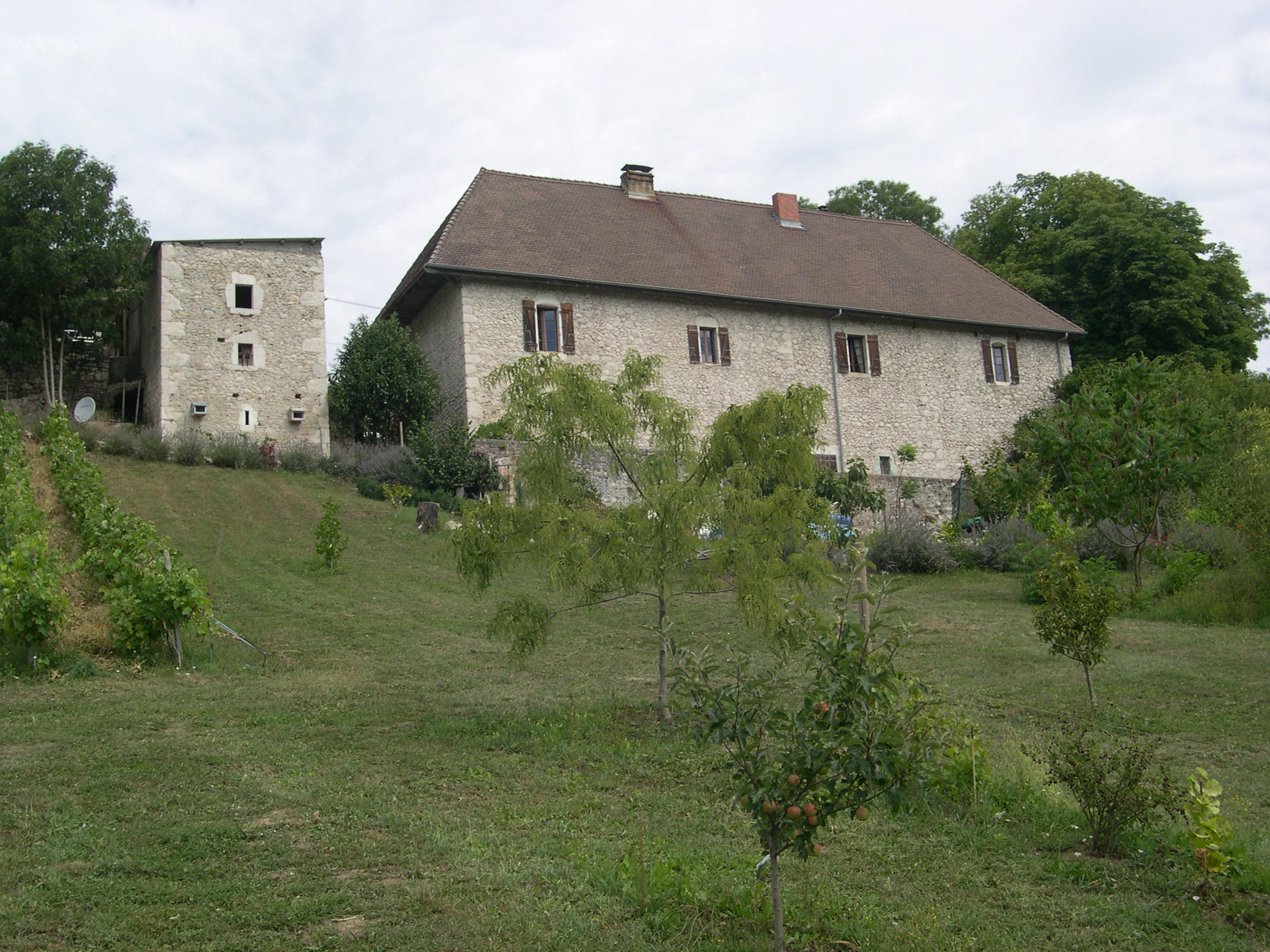 Ferme de Bel Air à Frangy ainsi que son pigeonnier